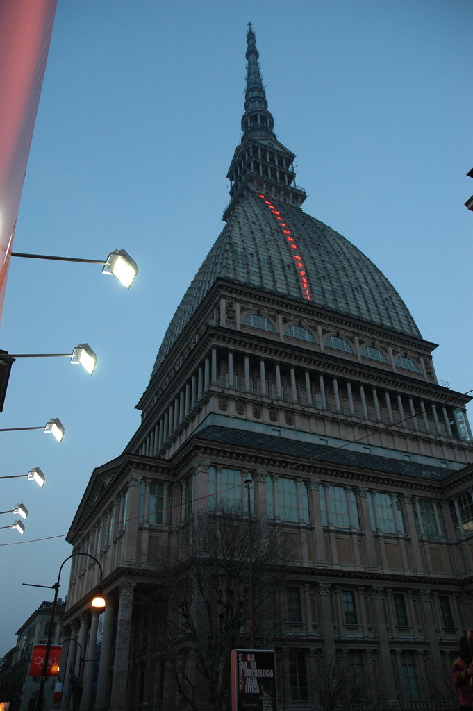 Torino,Italia